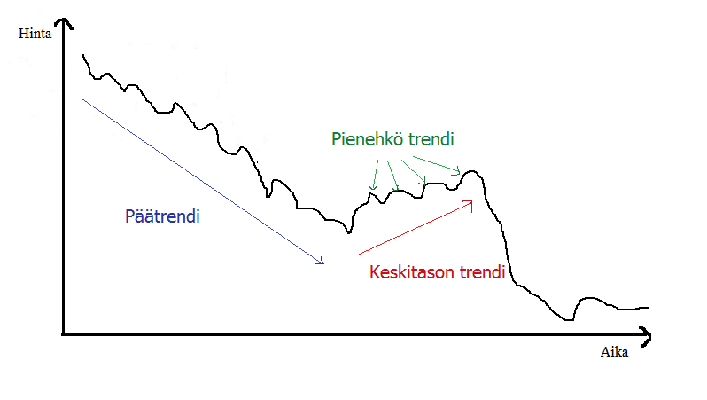 Päätrendi (Primary trend) vaikuttaa osakkeen hintoihin pitkällä aikavälillä useista kuukausista useisiin vuosiin. Keskitason trendi (Intermediate trend) on lyhyen aikavälin poikkeama päätrendistä. Pienehkö trendi (Minor trend) on päivittäistä hintatason vaihtelua.